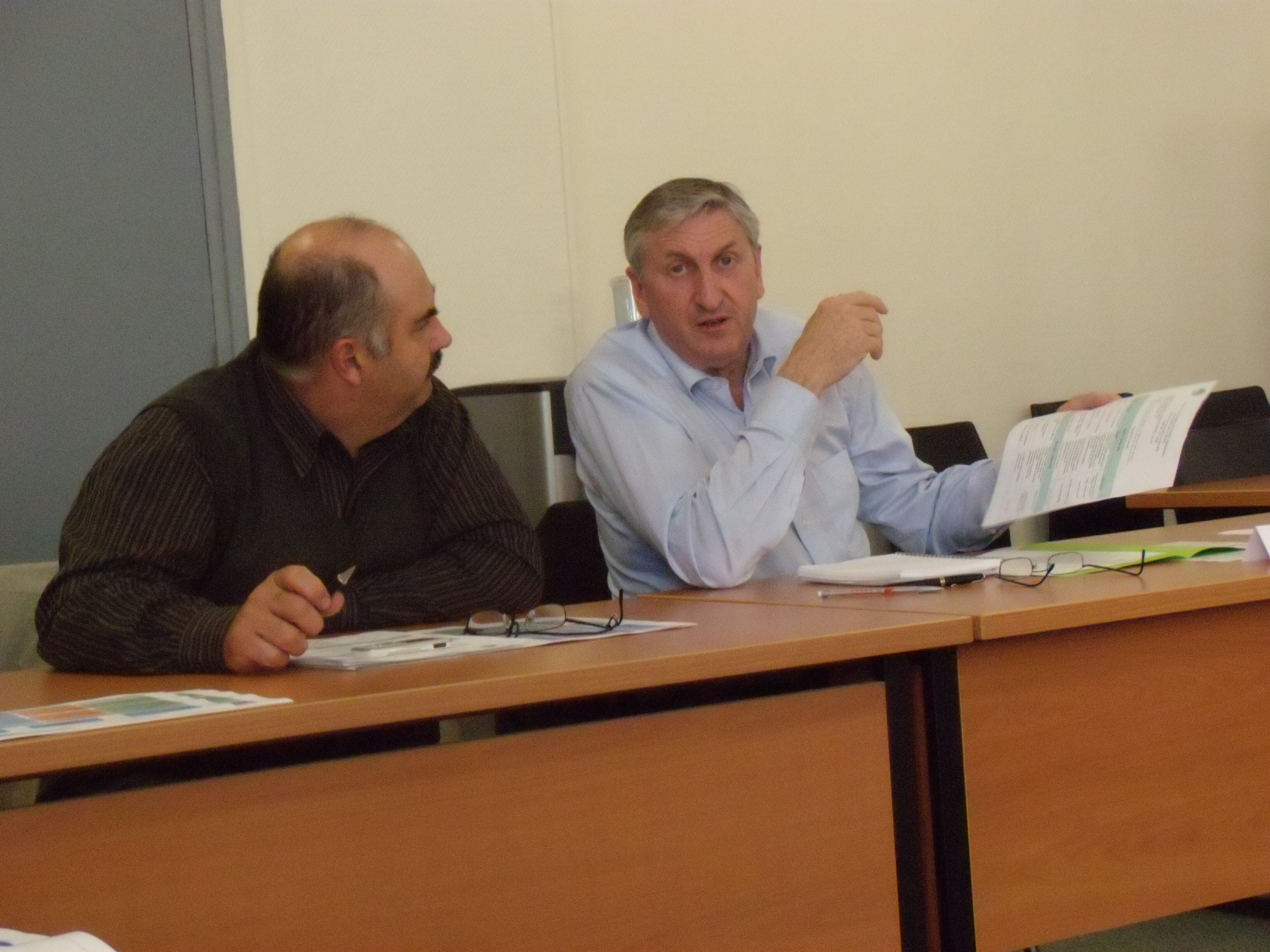 Jean-Michel Lemétayer au siège de la FNSEA. À côté de lui, Philippe Monteil, alors président de la FDSEA de la Creuse.